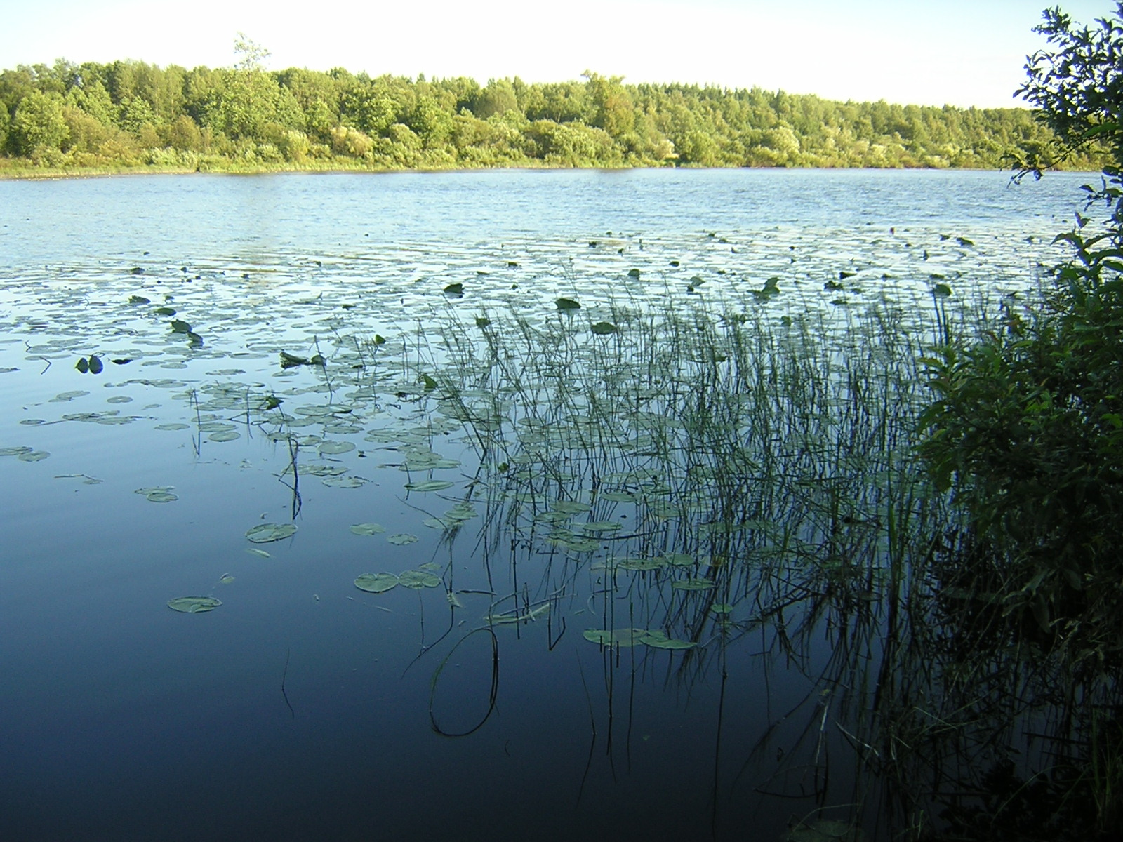 Lake Smekhro near Kovrov, Russia, Vladimir region. Озеро Смехро, Ковровский Владимирской области, Россия.